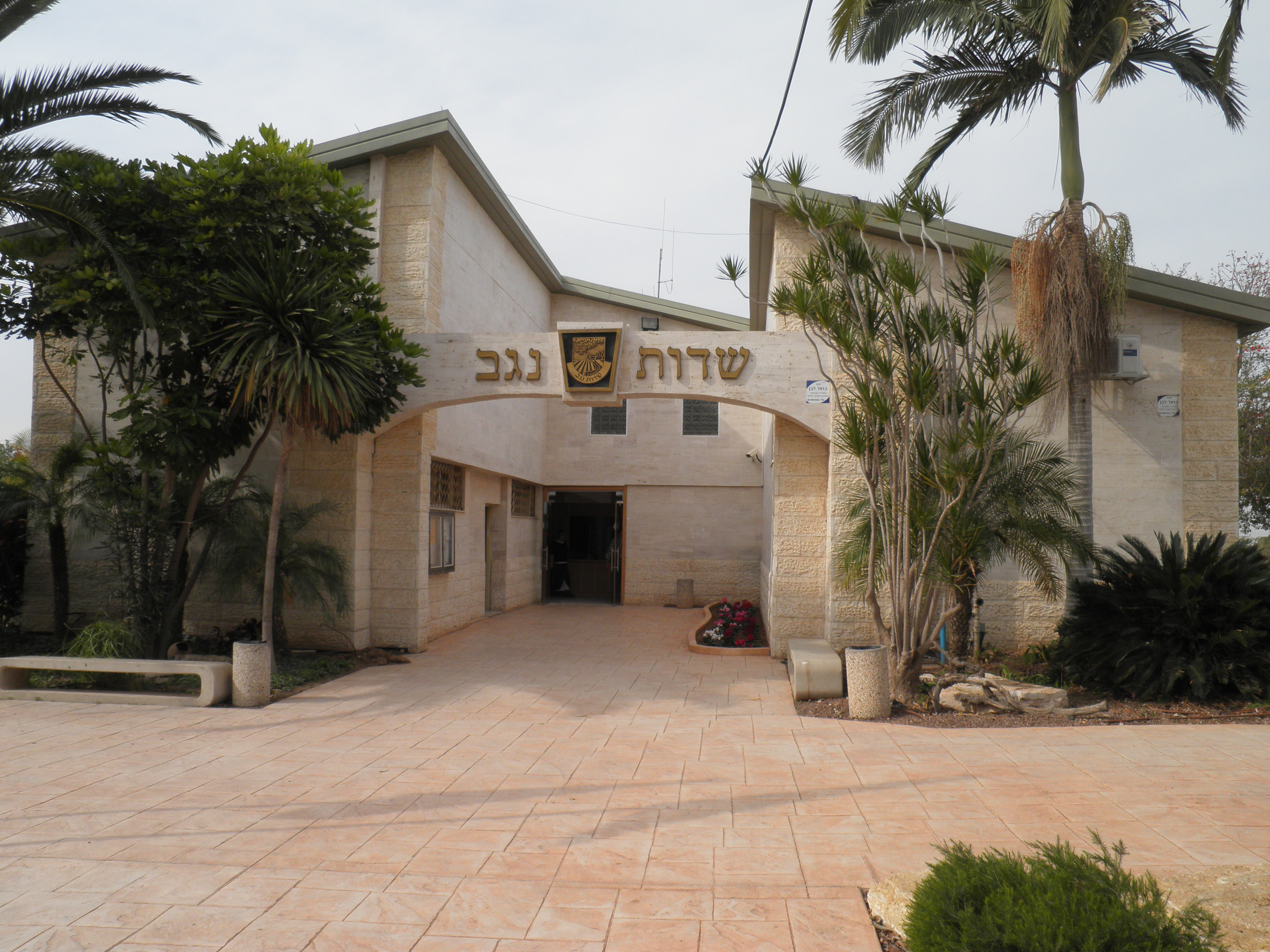 sdot negev sdot negev